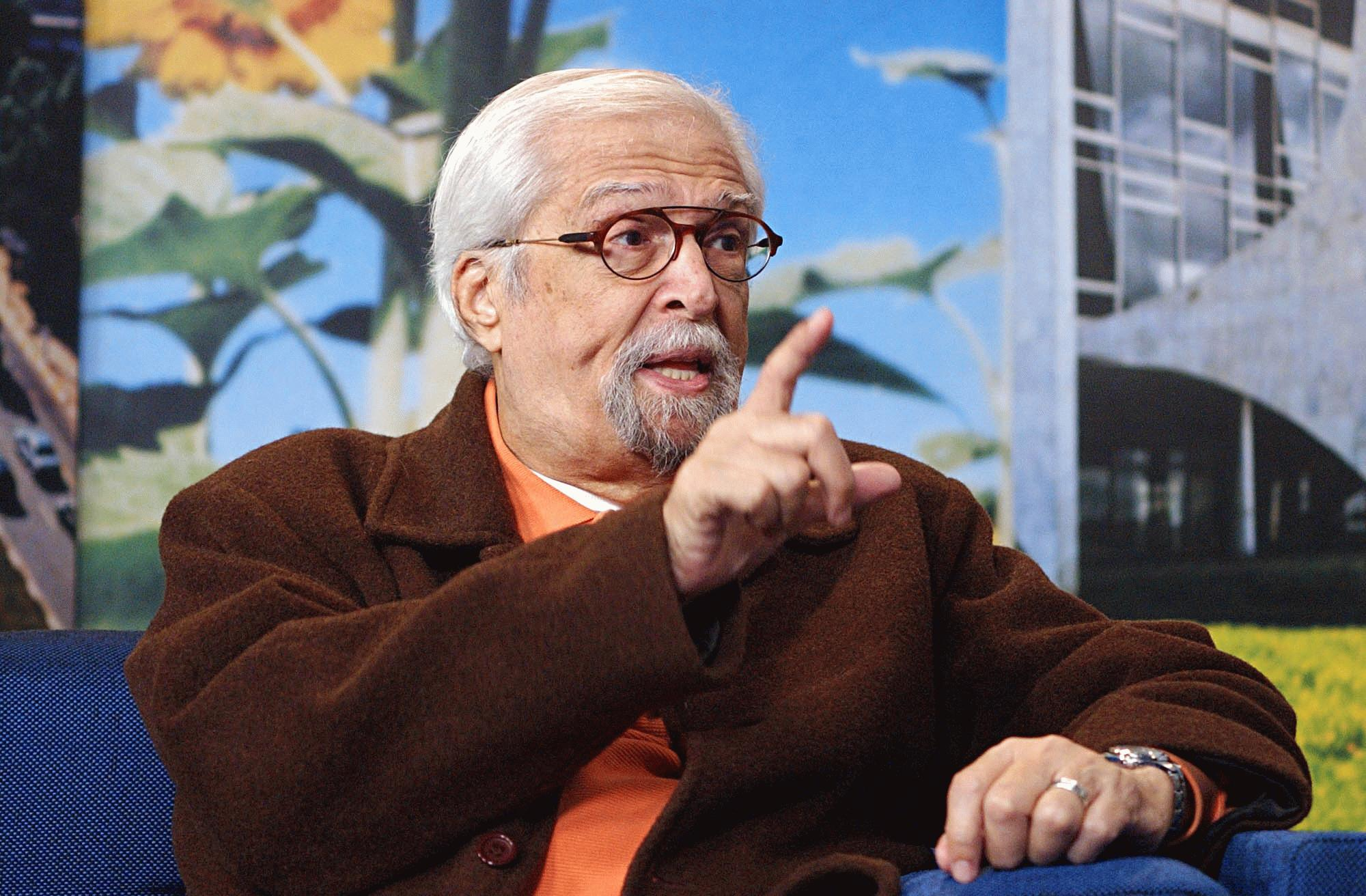 O ator Sérgio Britto, uma das personalidades mais importantes na história do teatro brasileiro.